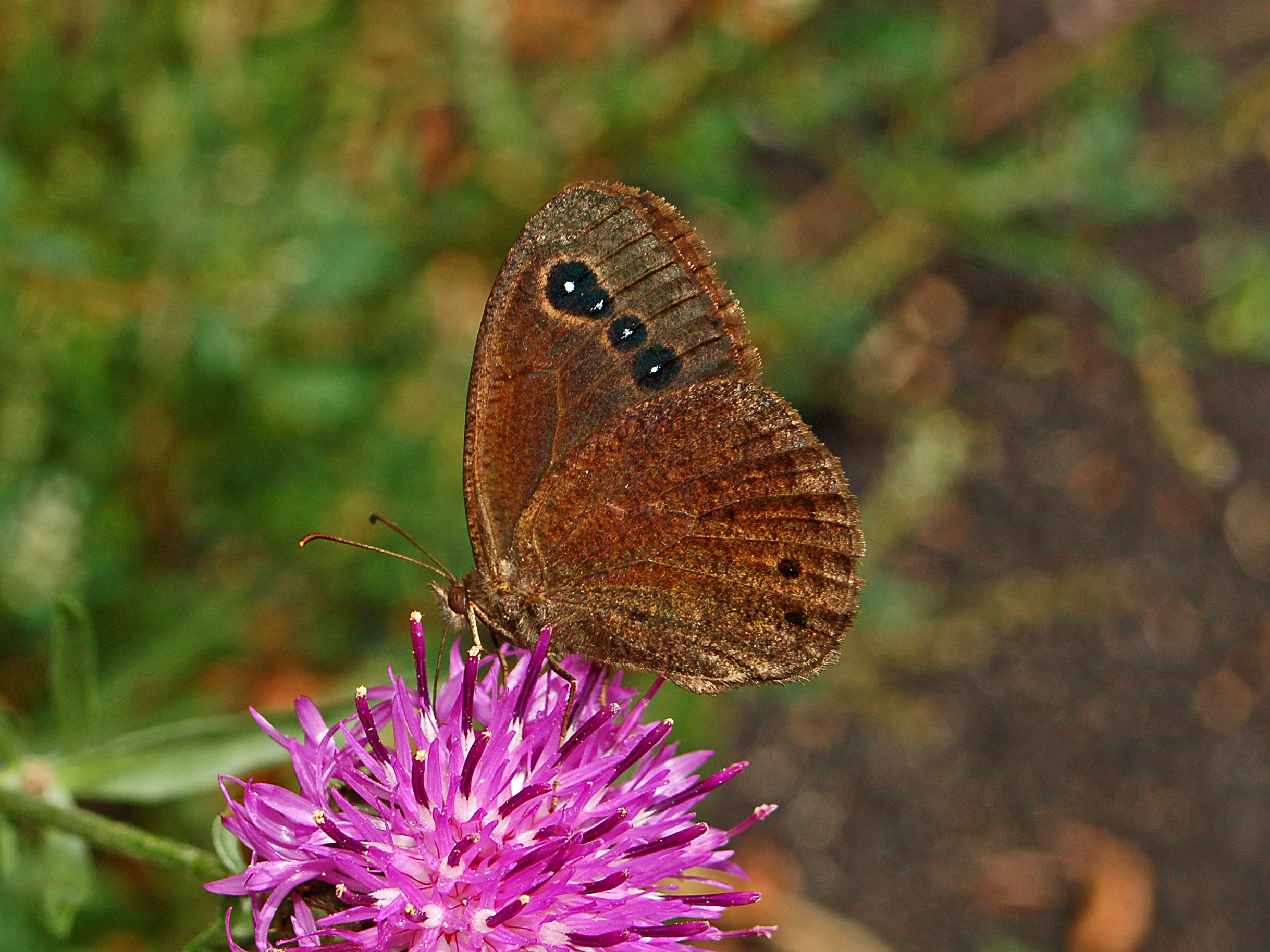 Satyrus ferula, male - Val Noci, Genova, Italy